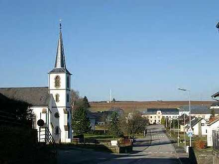 Binsfeld (Luxemburg)